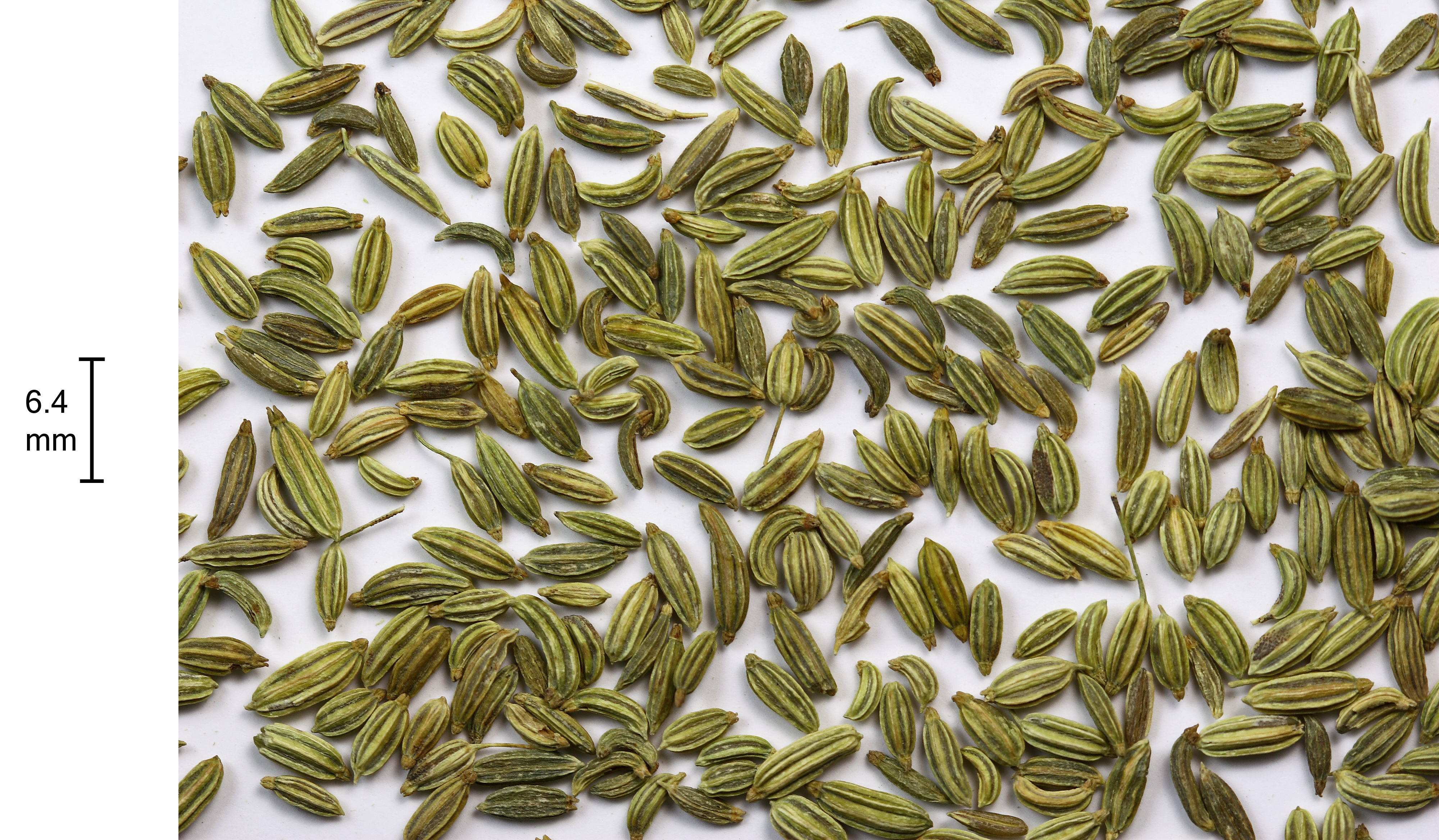 Fennel seeds (Foeniculum vulgare)